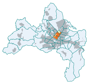 Freiburg im Breisgau, Stadtteil Stühlinger